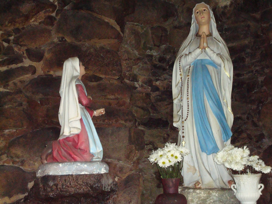 Closeup Gruta de Lourdes in Trujillo Alto, Puerto-Rico